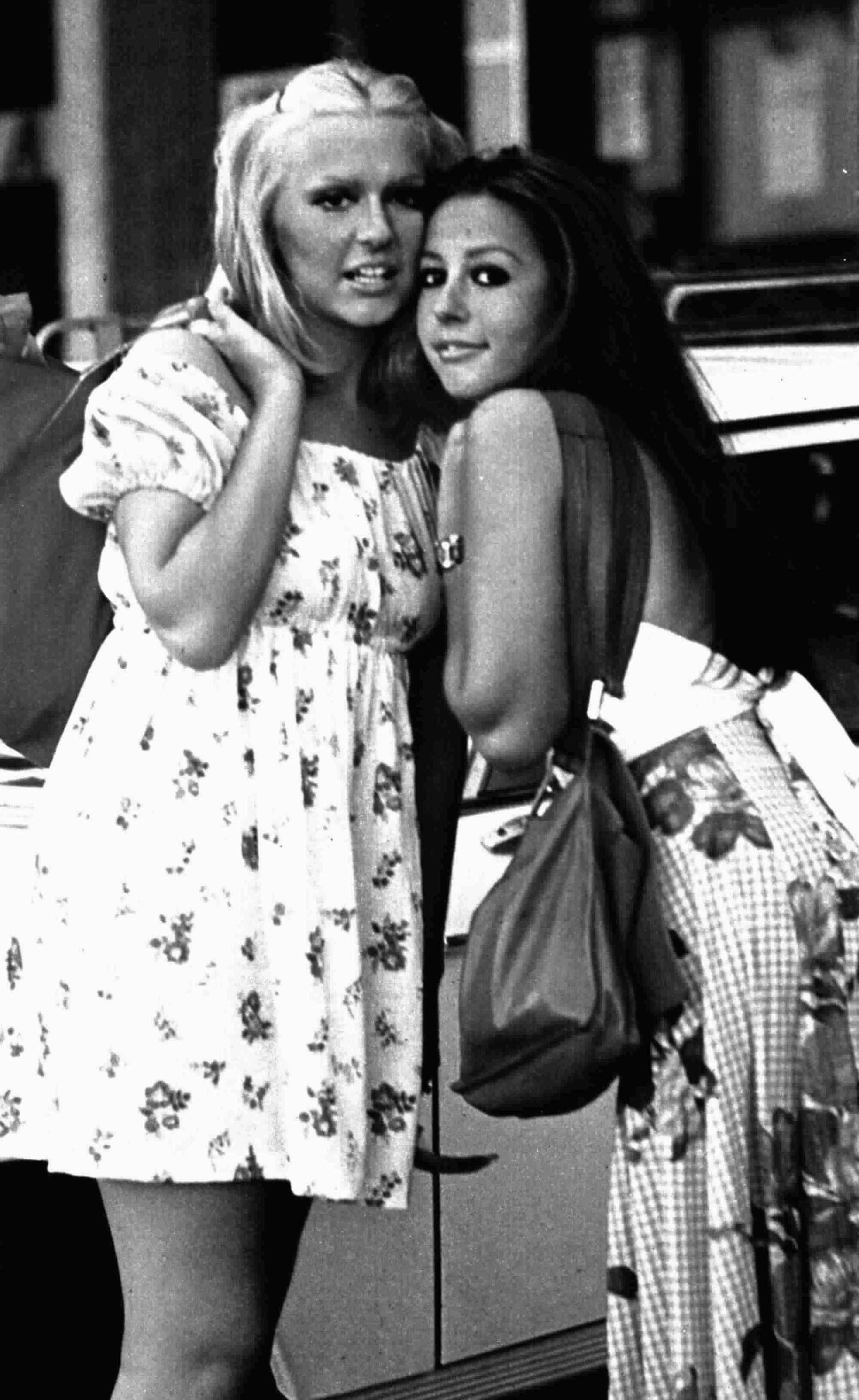 Italian actresses Loretta and Daniela Goggi